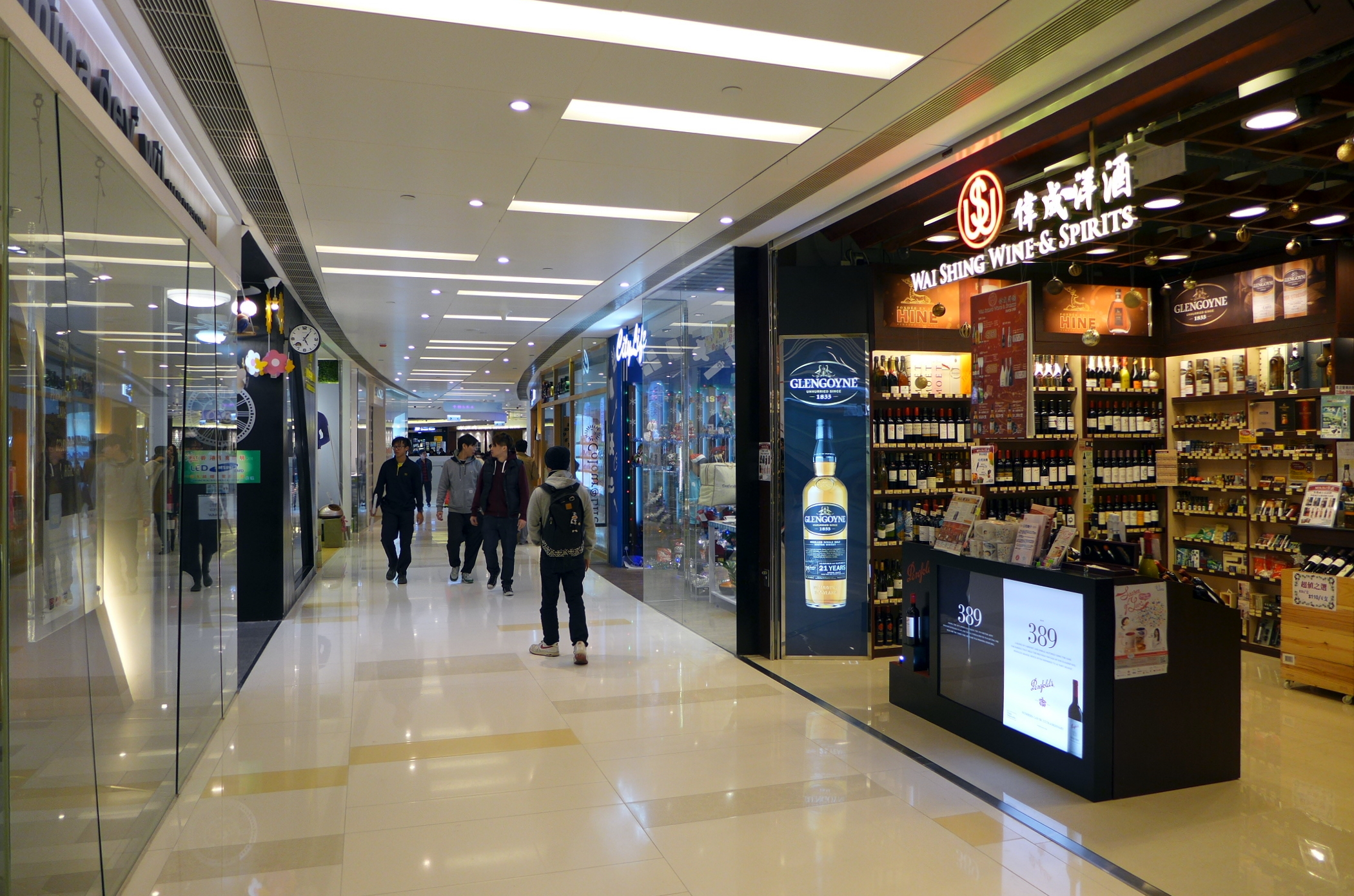 Mikiki Level 1 Shops